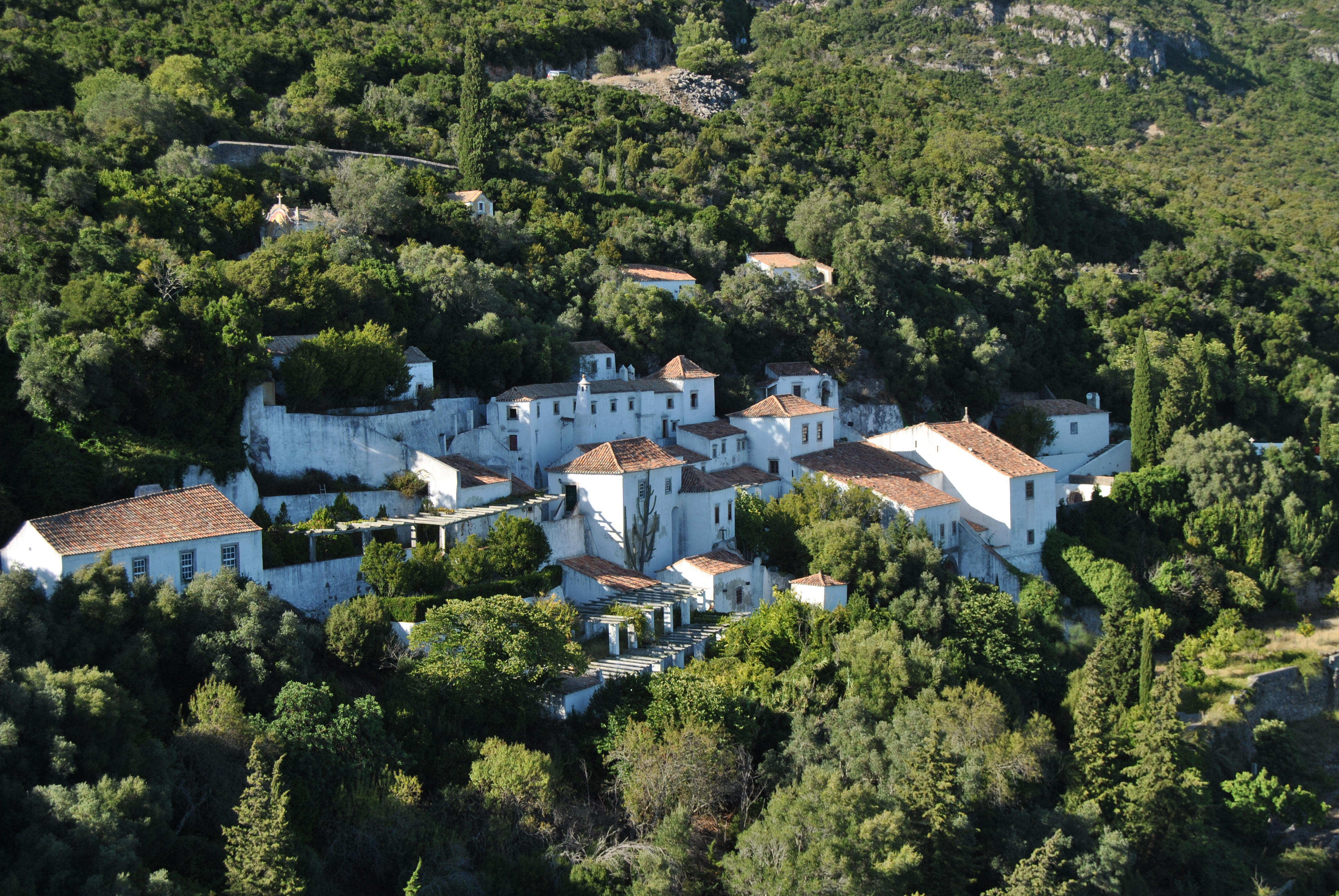 Serra Arrábida, Setubal This file was uploaded for Wiki Loves Monuments in Portugal with the unique identifier 74296.